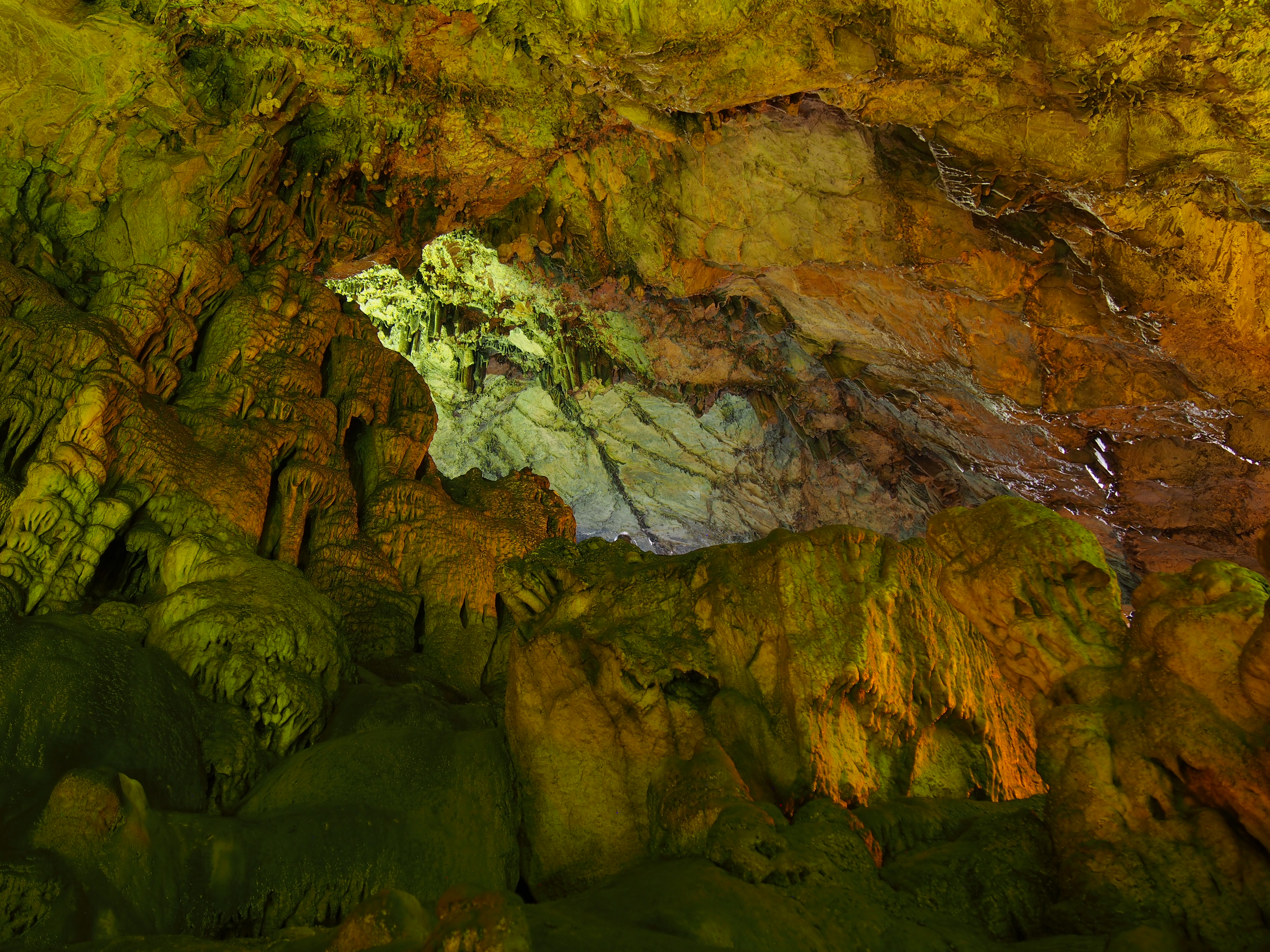 Κοιτώντας από τον πάτο του Δικταίου Άντρου προς τα πίσω This is a photography of Natura 2000 protected area with ID GR4320002